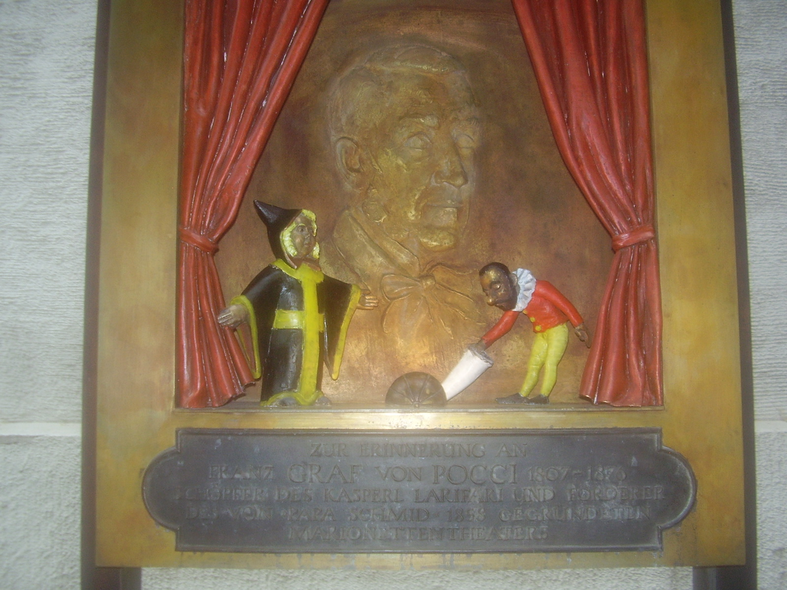 Erinnerungsschaukasten am Münchner Marionettentheater für Franz Graf von Pocci